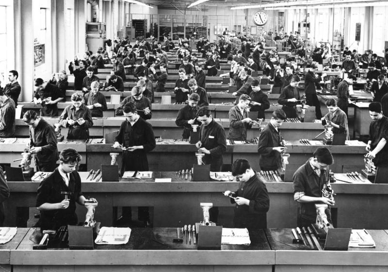 AEG-Fabrik, Mühlheim-Saarn, Lehrwerkstatt